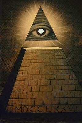 Pirâme com olho- Illuminatis